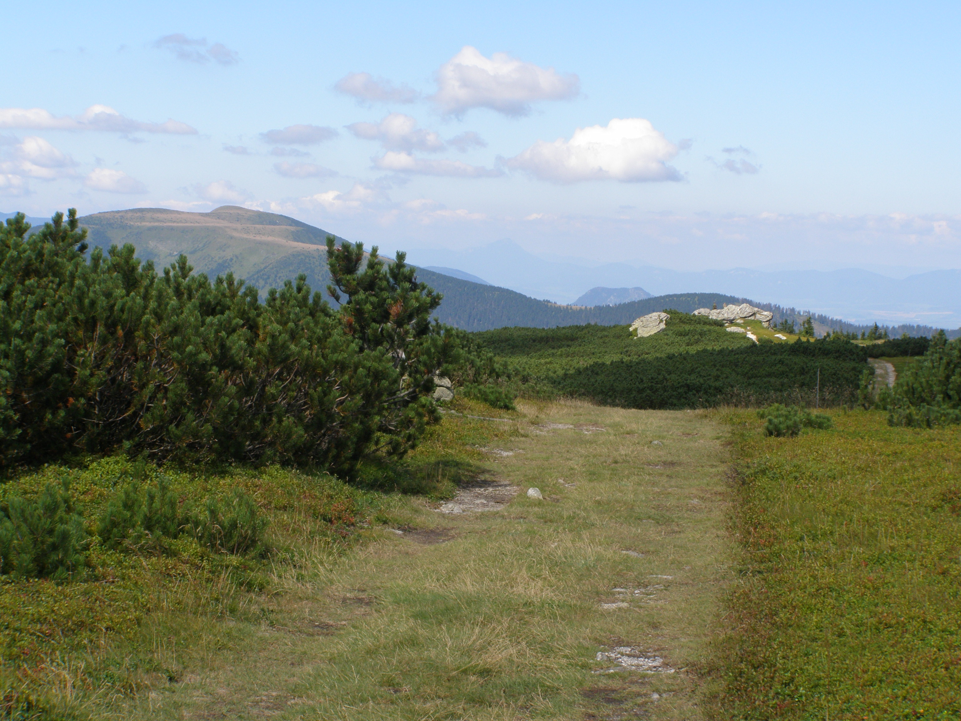 Nízké Tatry, Kráľovohoľské Tatry, pohled na vrchol Veľká Vápenica (1691 m) od východu, v pozadí vlevo vrchol Veľký Bok (1727 m)